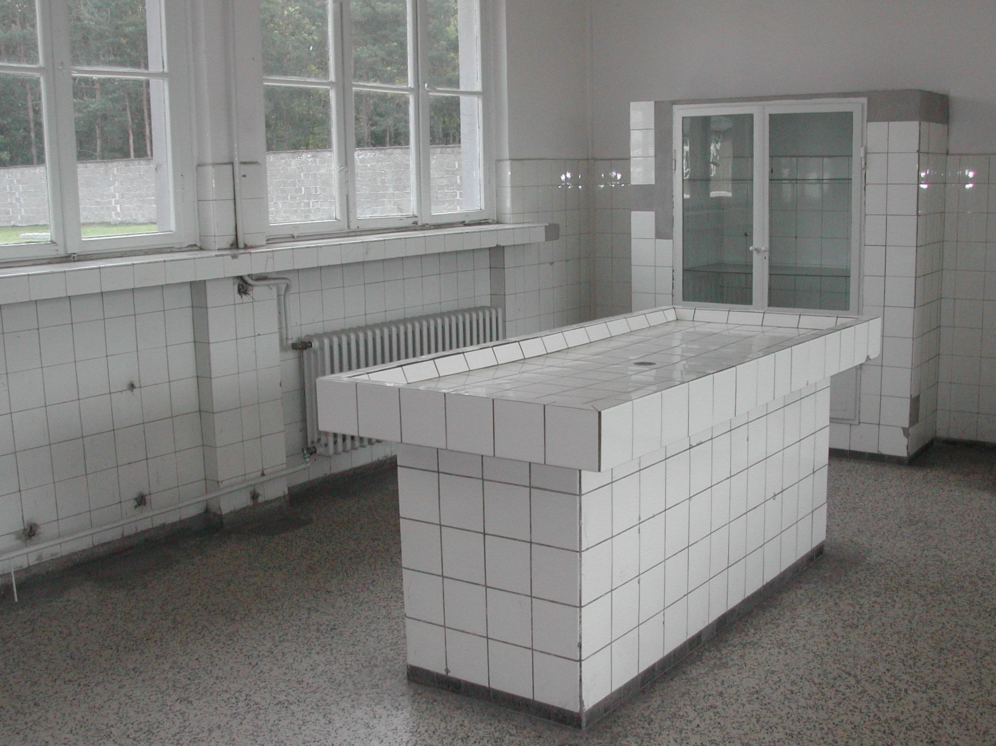 Sachsenhausen: tavolo per le autopsie